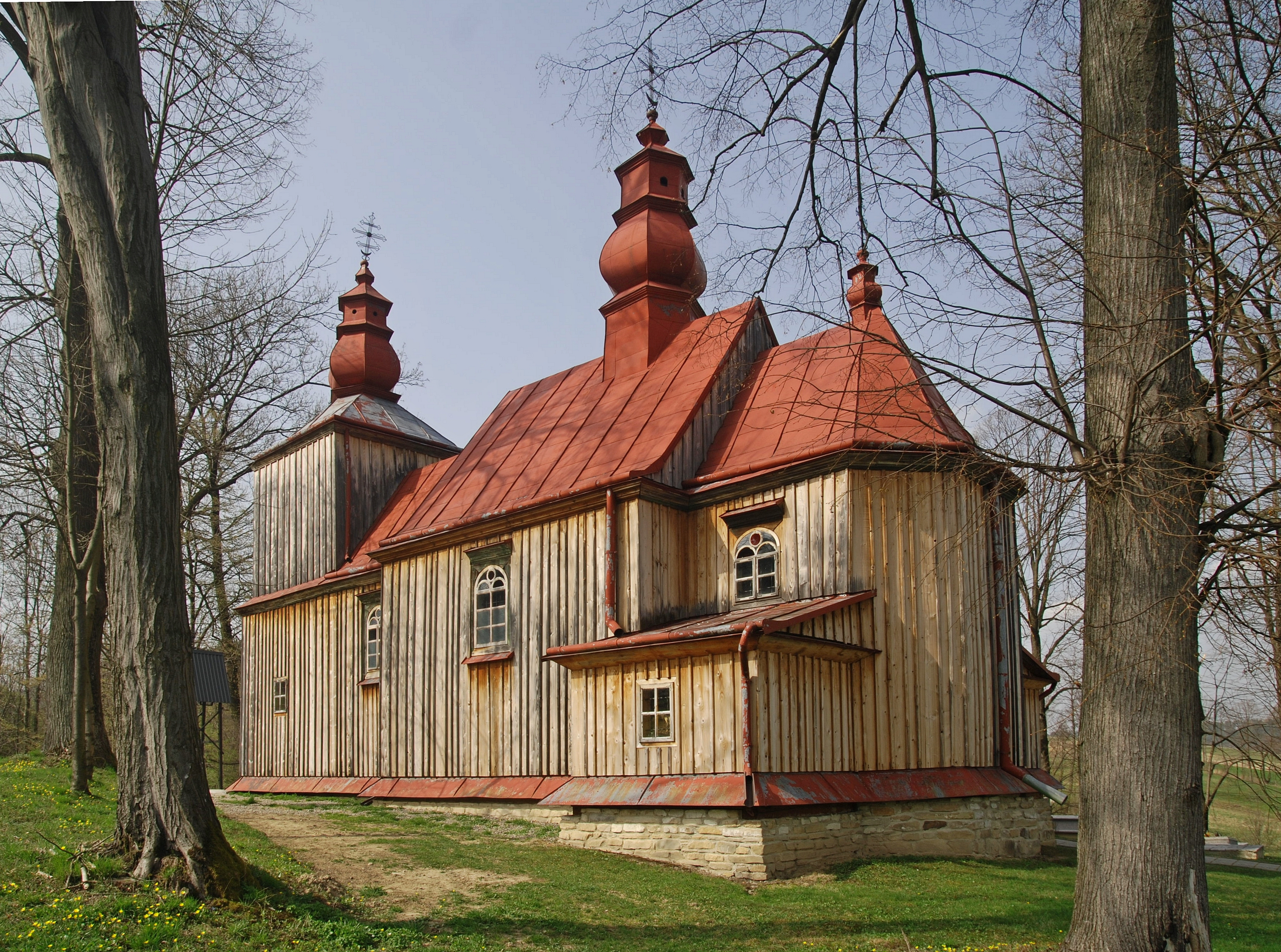 wieś Hołuczków, cerkiew św. Paraskewyi Wikidata has entry Q9188030 with data related to this item.